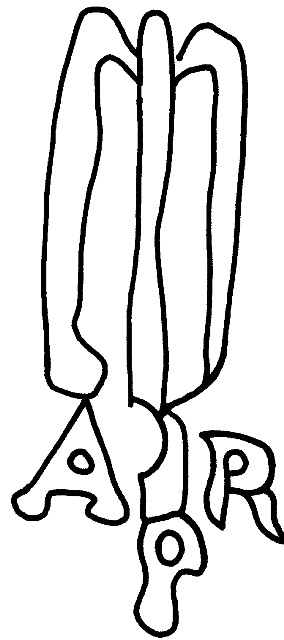 Filigrane de la papeterie de Rives en 1573, selon l'ouvrage de Charles-Moïse Briquet : « Les filigranes. Dictionnaire historique des marques du papier dès leur apparition vers 1282 jusqu'en 1600»